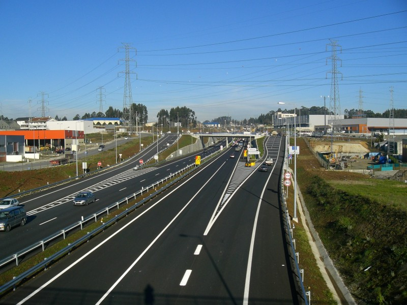 A41, Rotunda de Alfena